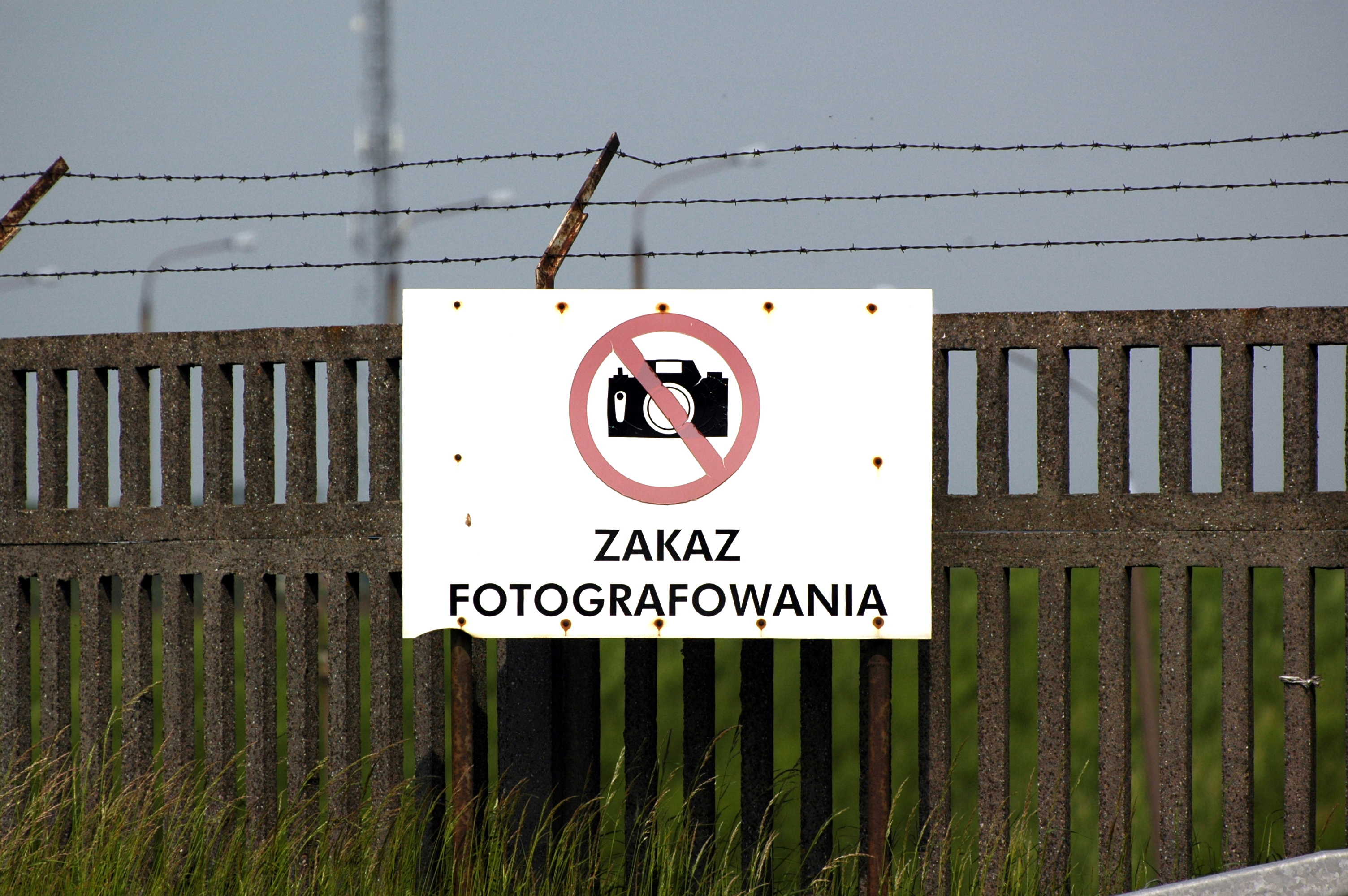 Petrochemia płocka PKN Orlen